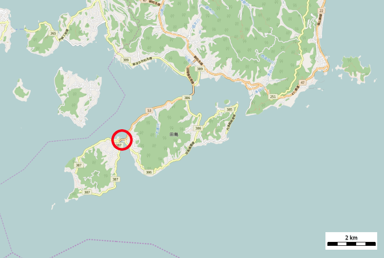 広島県福山市内海町の睦橋周辺 This map may be incomplete, and may contain errors. Don't rely solely on it for navigation.